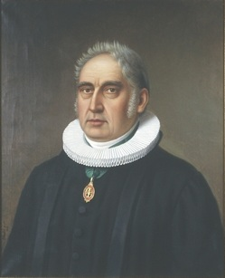 Portrett av Hans Jacob Stabel (født 1769, død 1836), prest og medlem av Riksforsamlingen på Eidsvoll 17. mai 1814. Eier: Eidsvoll 1814